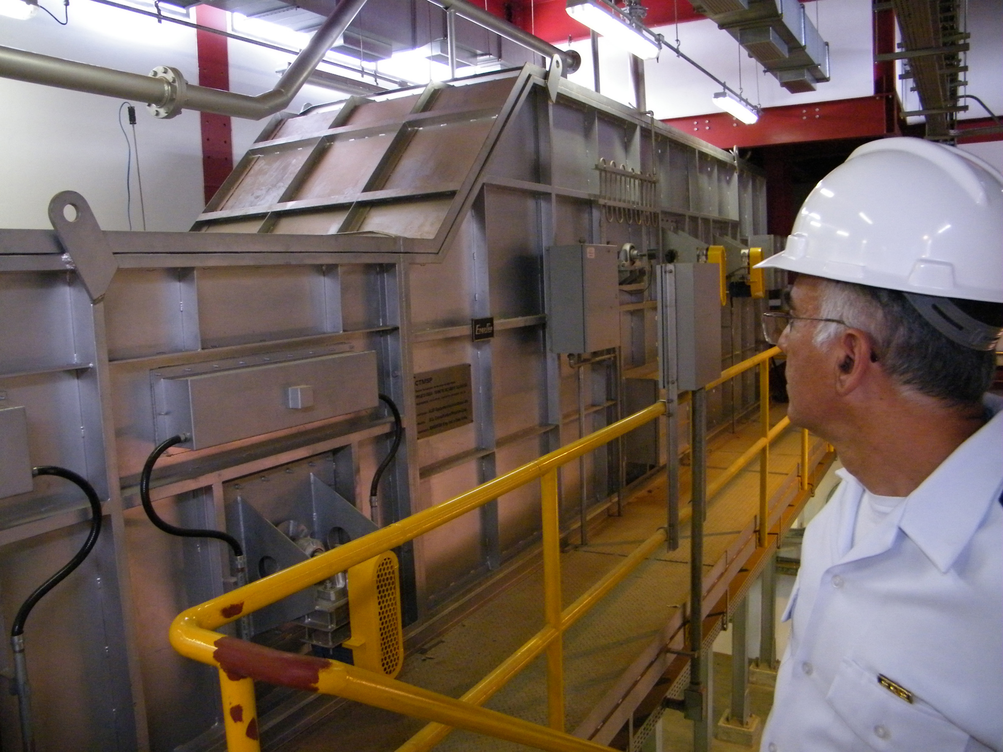 Usina de Hexafluoreto de Urânio (Usexa), no complexo militar de Aramar, em Iperó (SP) - Forno específico necessário ao processo de conversão do urânio em pó no gás hexafluoreto de urânio, teve de ser construído no Brasil. (Foto reporter Vladimir Platonow / ABr)